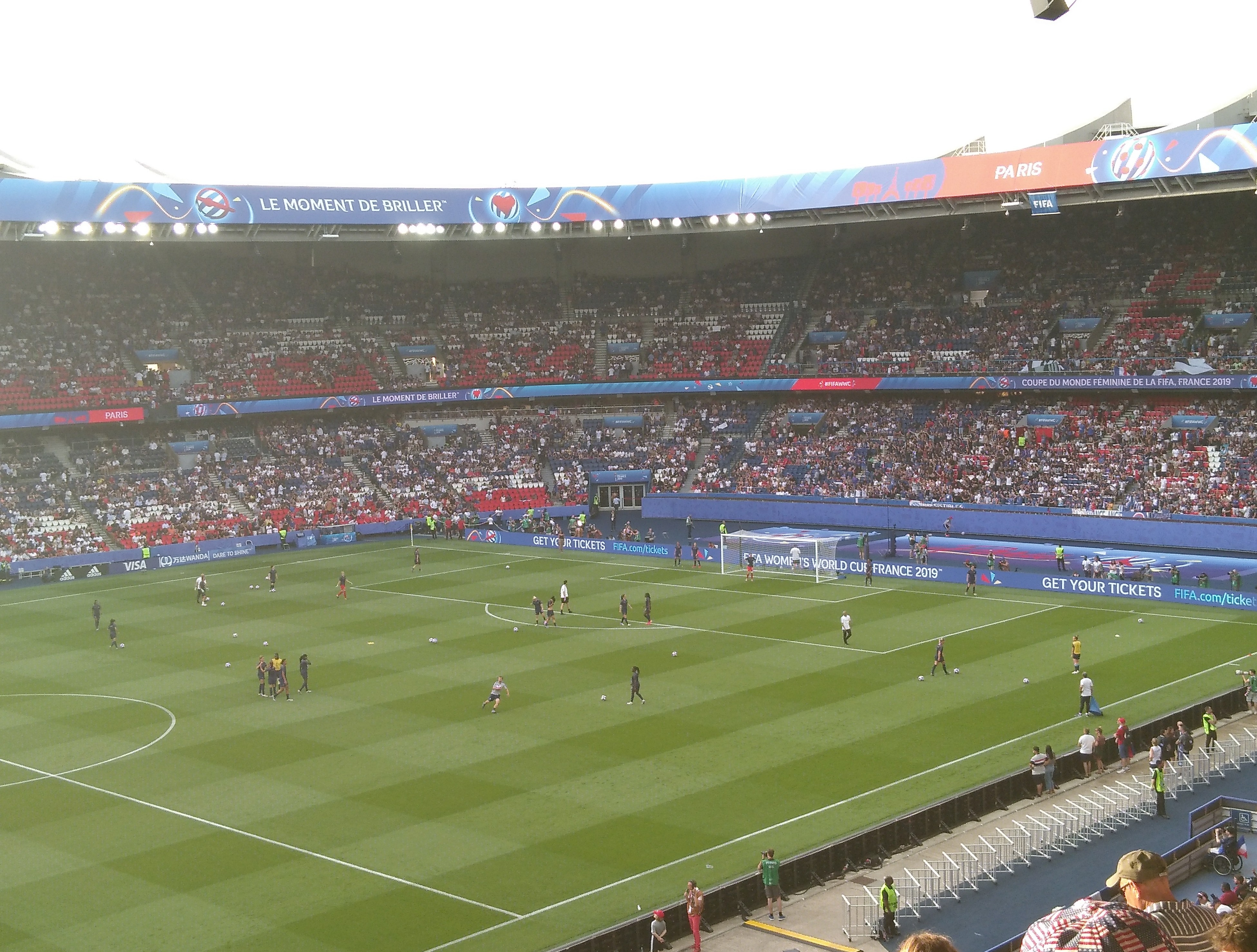 Quart de finale France vs USA au Parc des Princes le 28 juin 2019 : échauffement